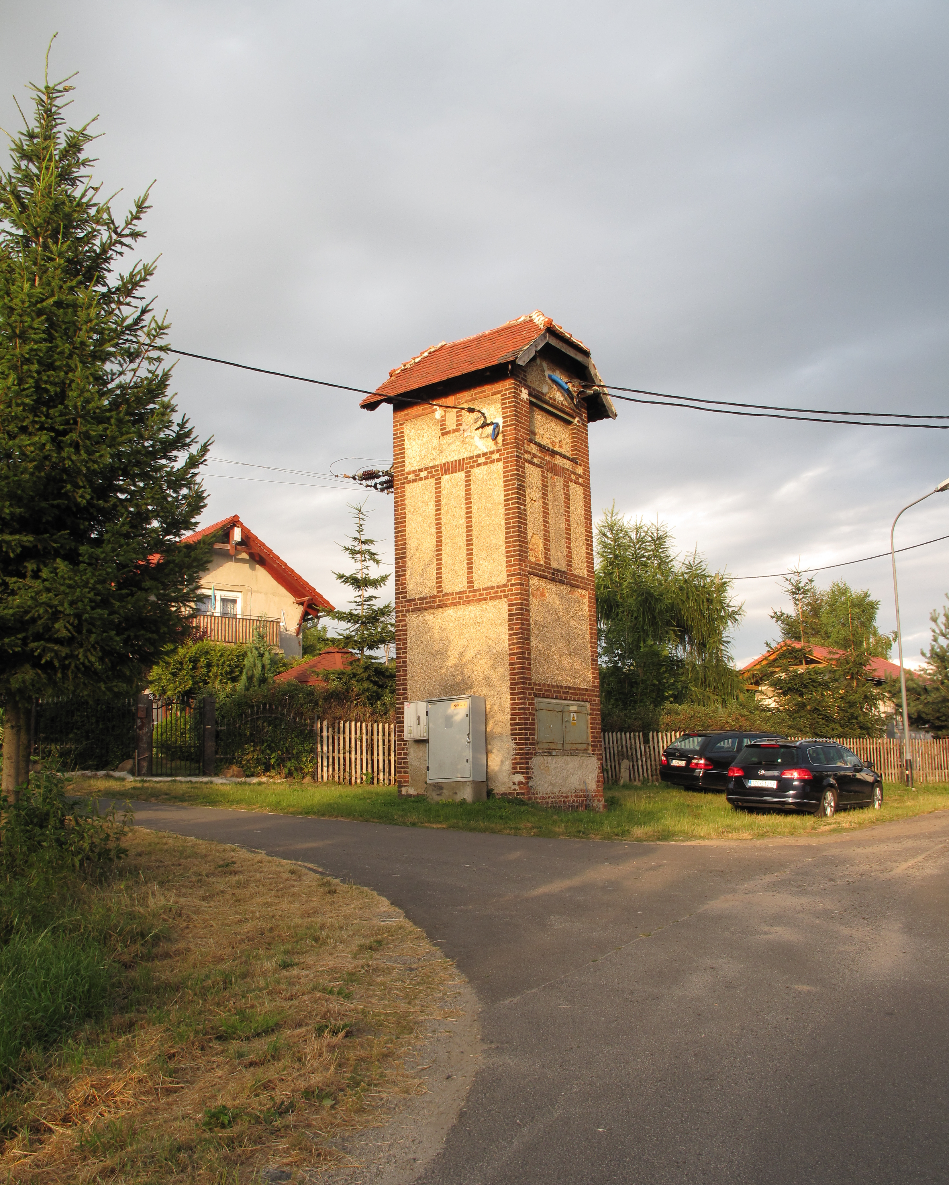 Nowoszyce (powiat zgorzelecki). Polska.